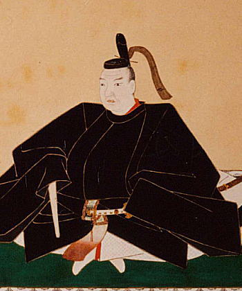 池田綱政（第6代岡山城主）、Ikeda Tsunamasa(the 6th Okayama castellan)